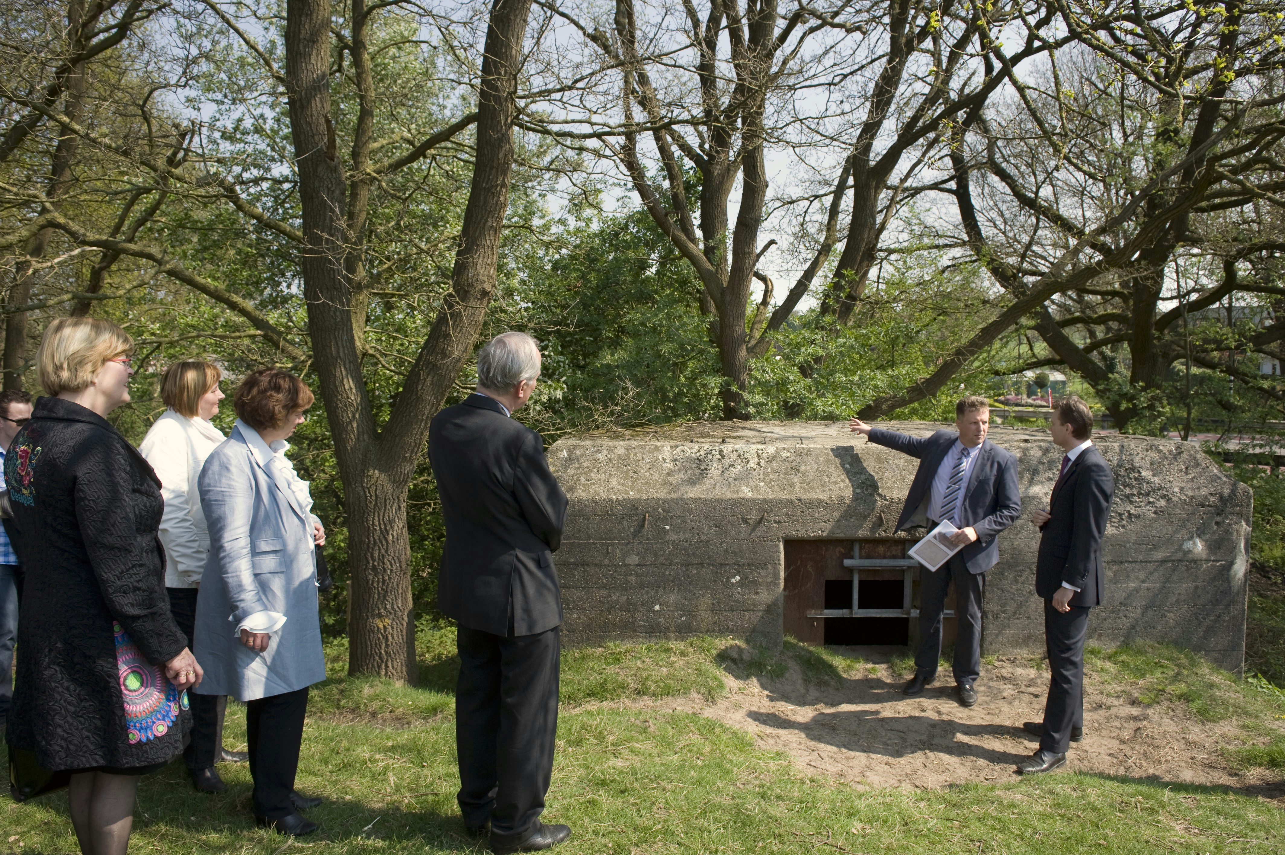 Grebbelinie: Renswoude - Aanwijzen Grebbelinie tot Rijksmonument, werkbezoek Halbe Zijlstra, Staatssecretaris van Onderwijs, Cultuur en Wetenschap. (opmerking: Fotoreportage naar aanleiding van de aanwijzing van de Grebbelinie tot Rijksmonument door Halbe Zijlstra, staatssecretaris van Cultuur)